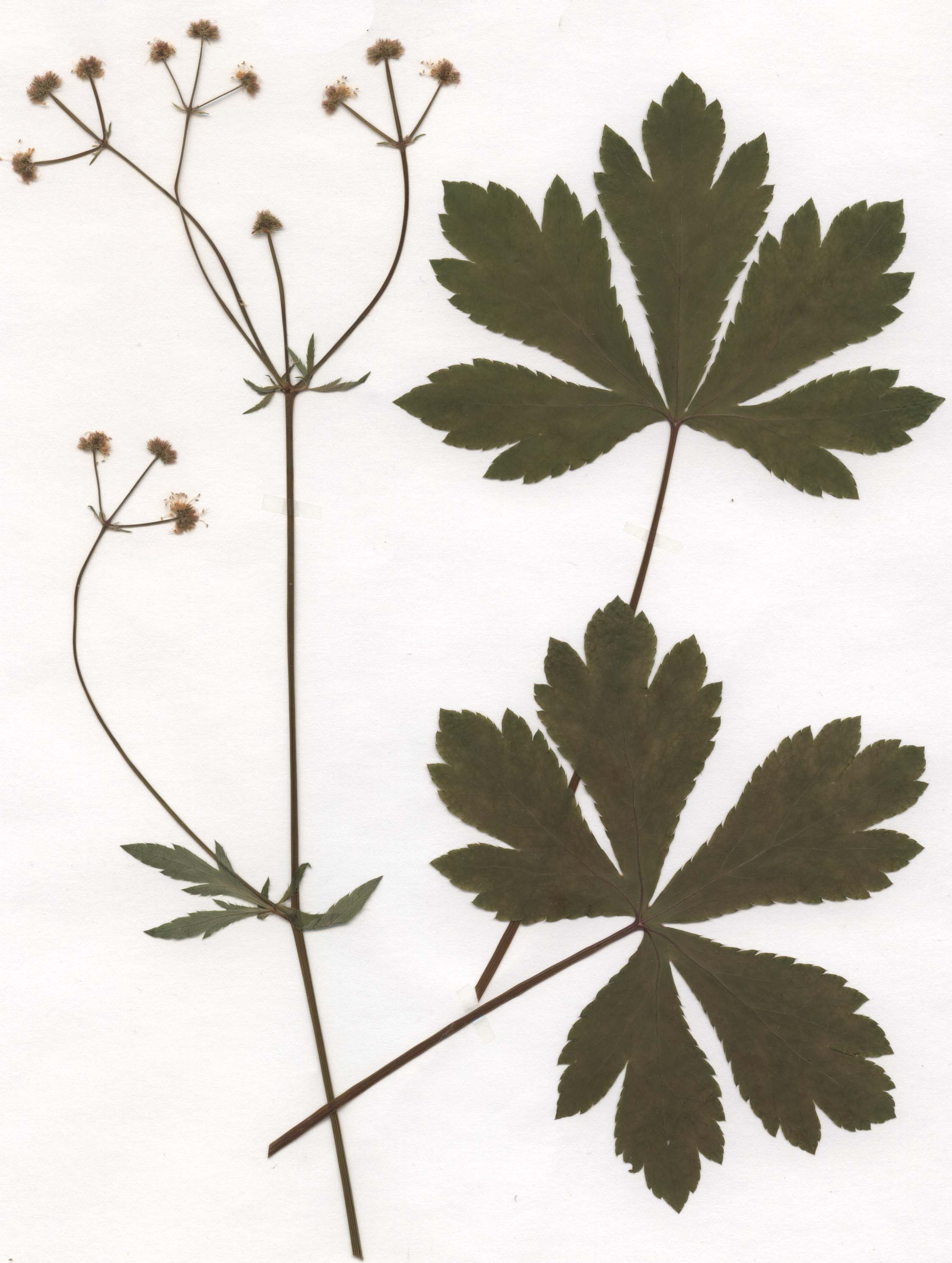 Sanicula europaea, eigener Herbarbeleg von 1986, Unterfranken